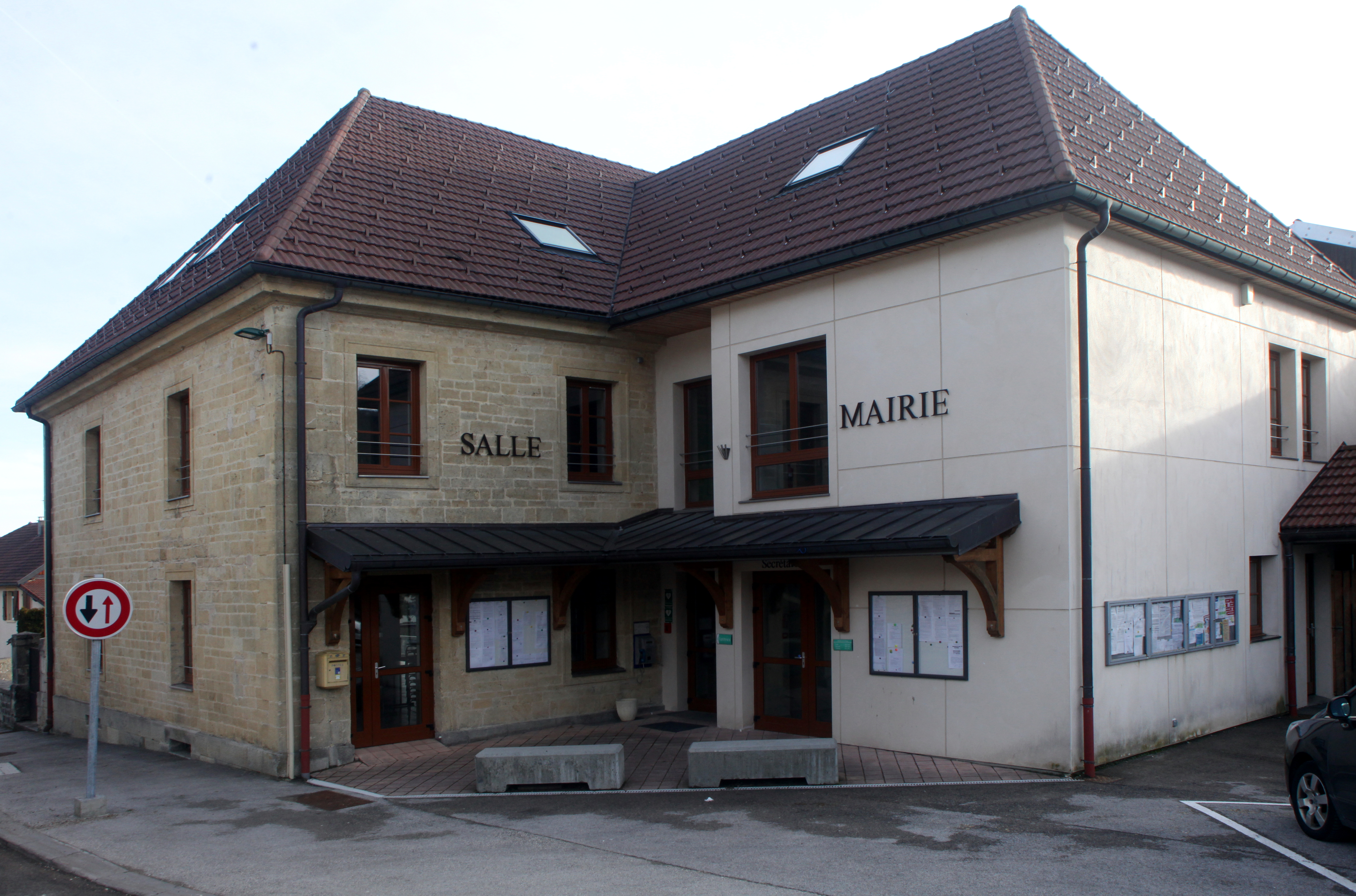 Mairie de Vuillecin (Doubs).